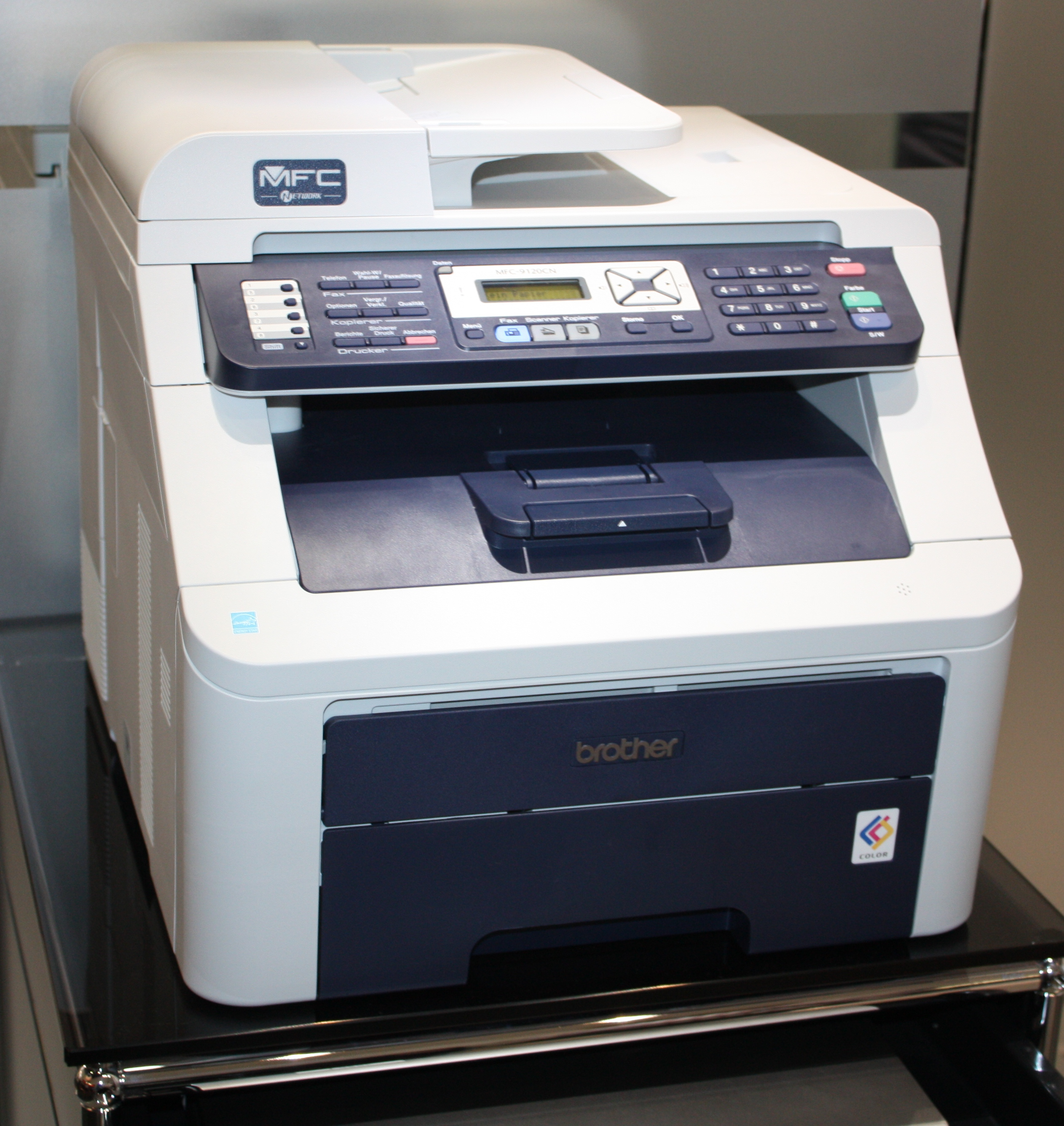 Internationale Funkausstellung 2012 , Brother